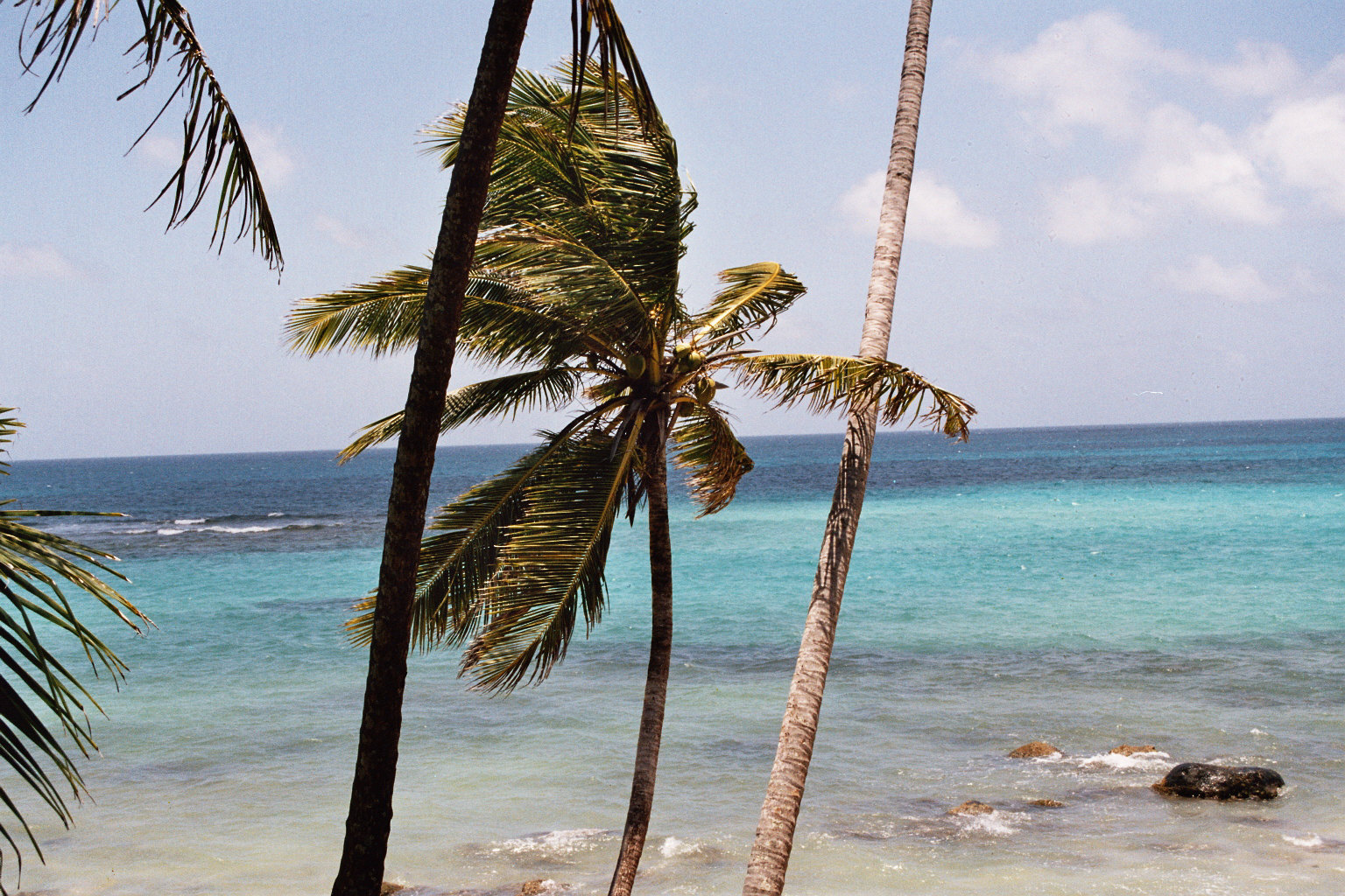 Blick aufs Meer von der nicaraguensischen Insel Big Corn Island